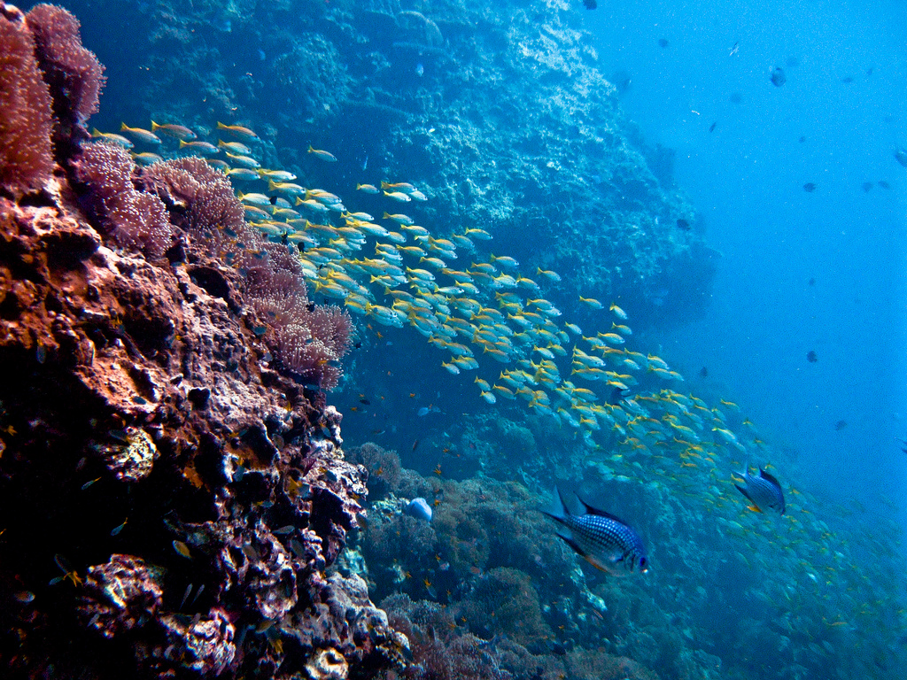 2010 Thailand Koh Phi Phi & Lanta scuba diving